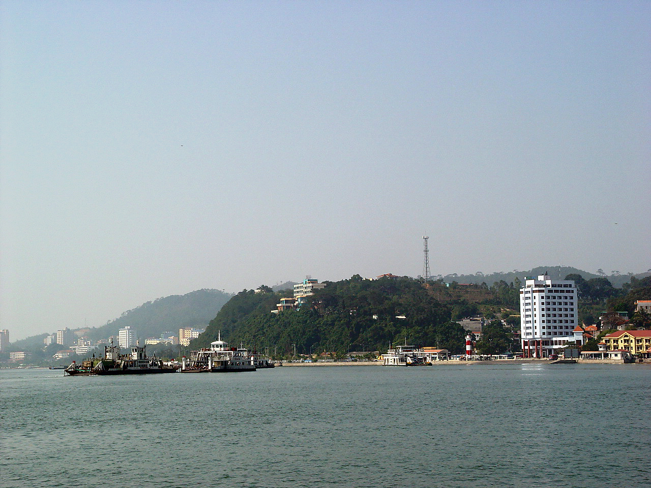 Phà Bãi Cháy